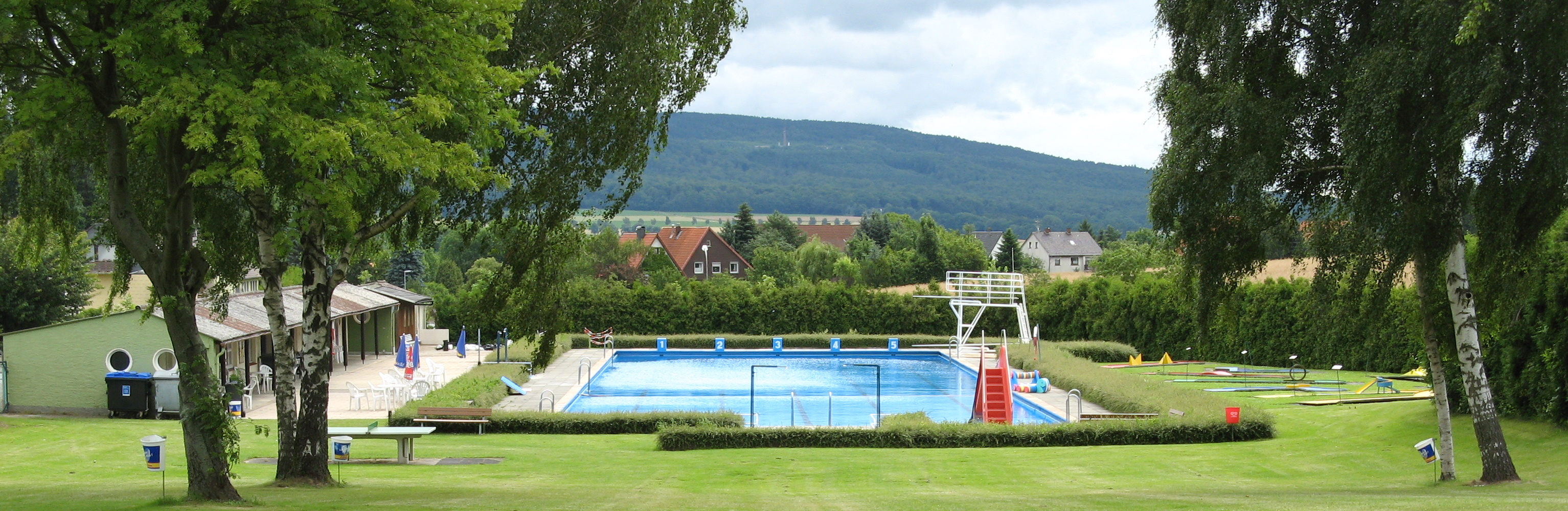 Freibad Coppenbrügge, Blick von oben, im Hintergrund Coppenbrügge und der Osterwald